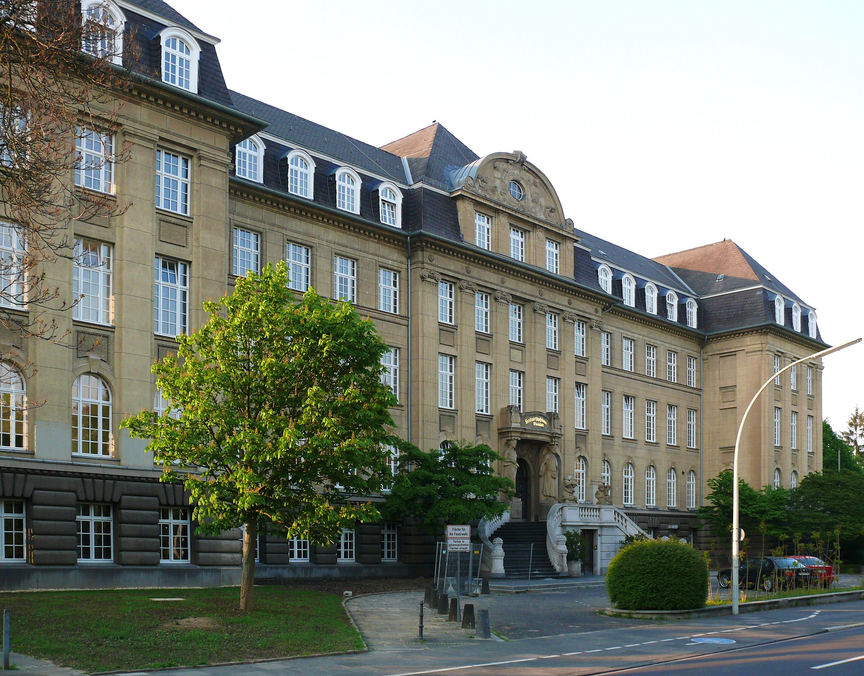 Gebäude der ehemaligen Landwirtschaftskammer Rheinland in Bonn